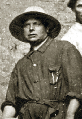 Excavacions del SIP a la Cova del Parpalló, vers 1930.